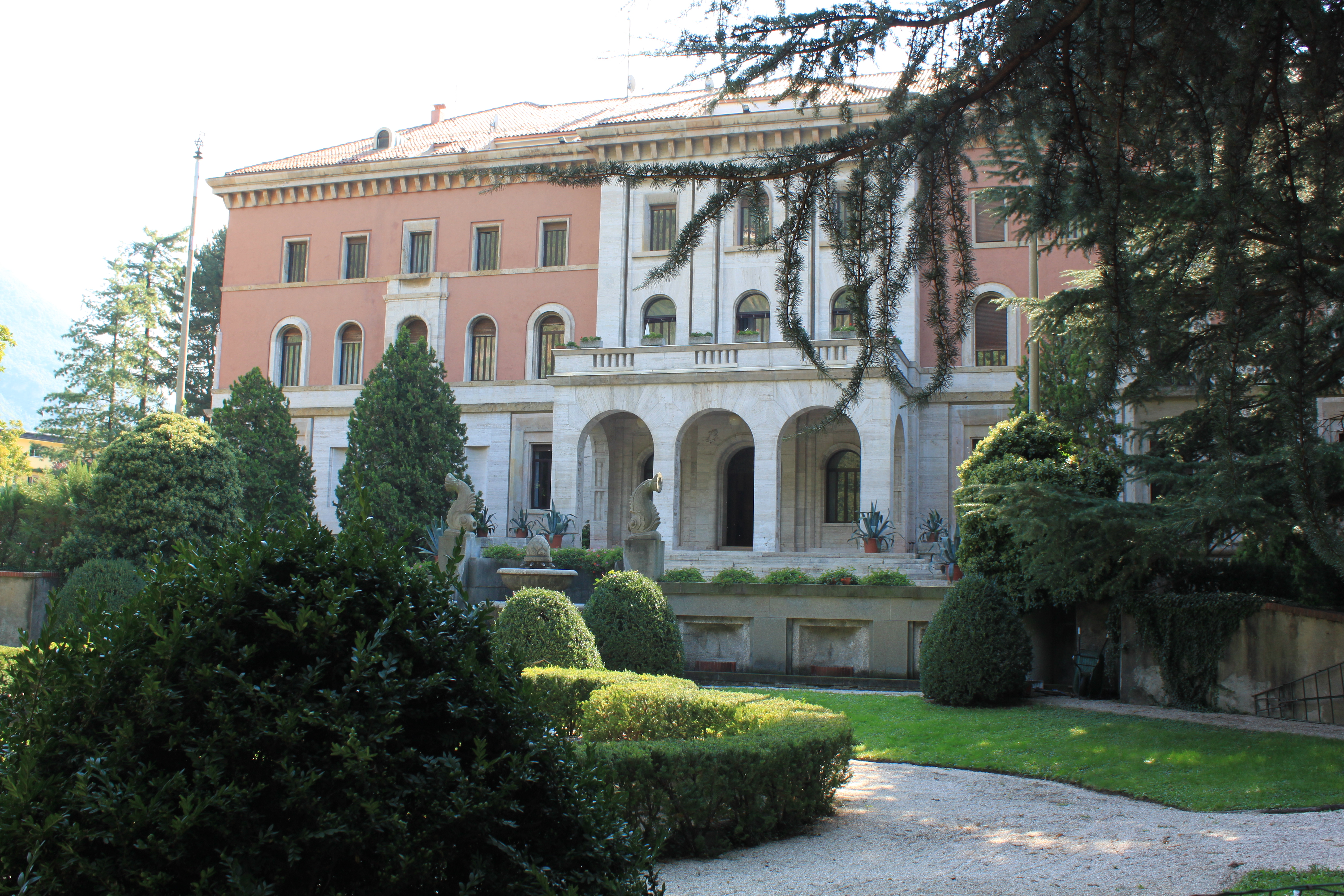 Herzogspalast (vormals Villa Wendlandt)